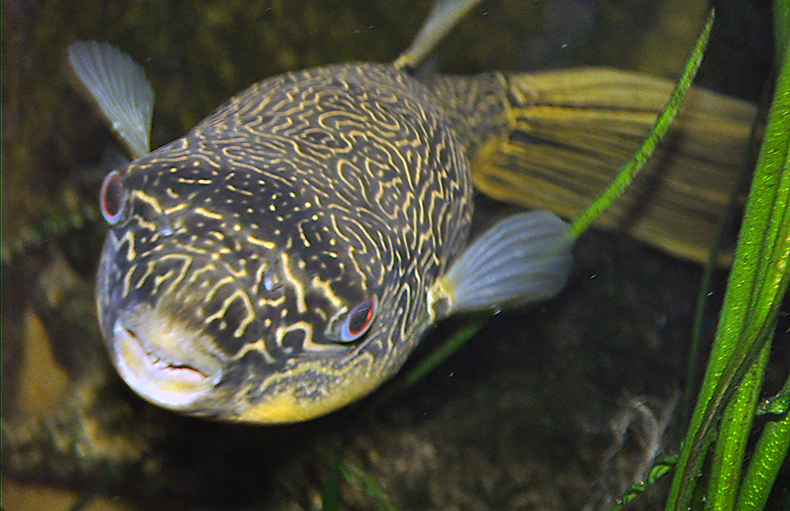 Tetraodon mbu, Aquazoo Düsseldorf, Heimat: Afrika, der größte Süßwasser-Kugelfisch